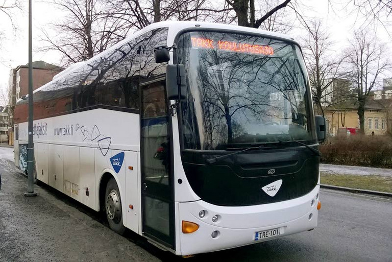 Entinen Netti-Nysse teipattuna Tampereen aikuiskoulutuskeskuksen väreihin.